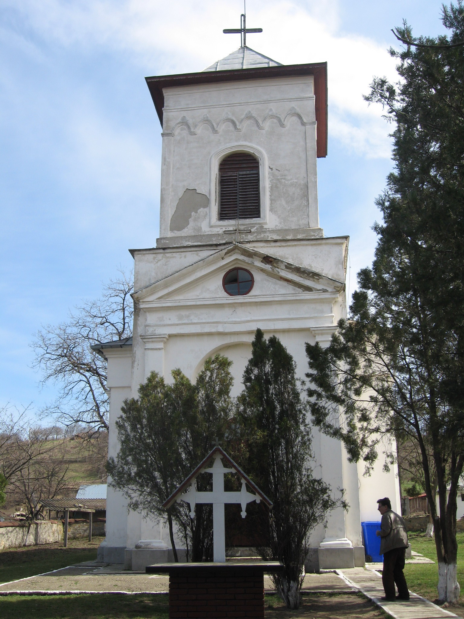 Conacul din Soleşti 04